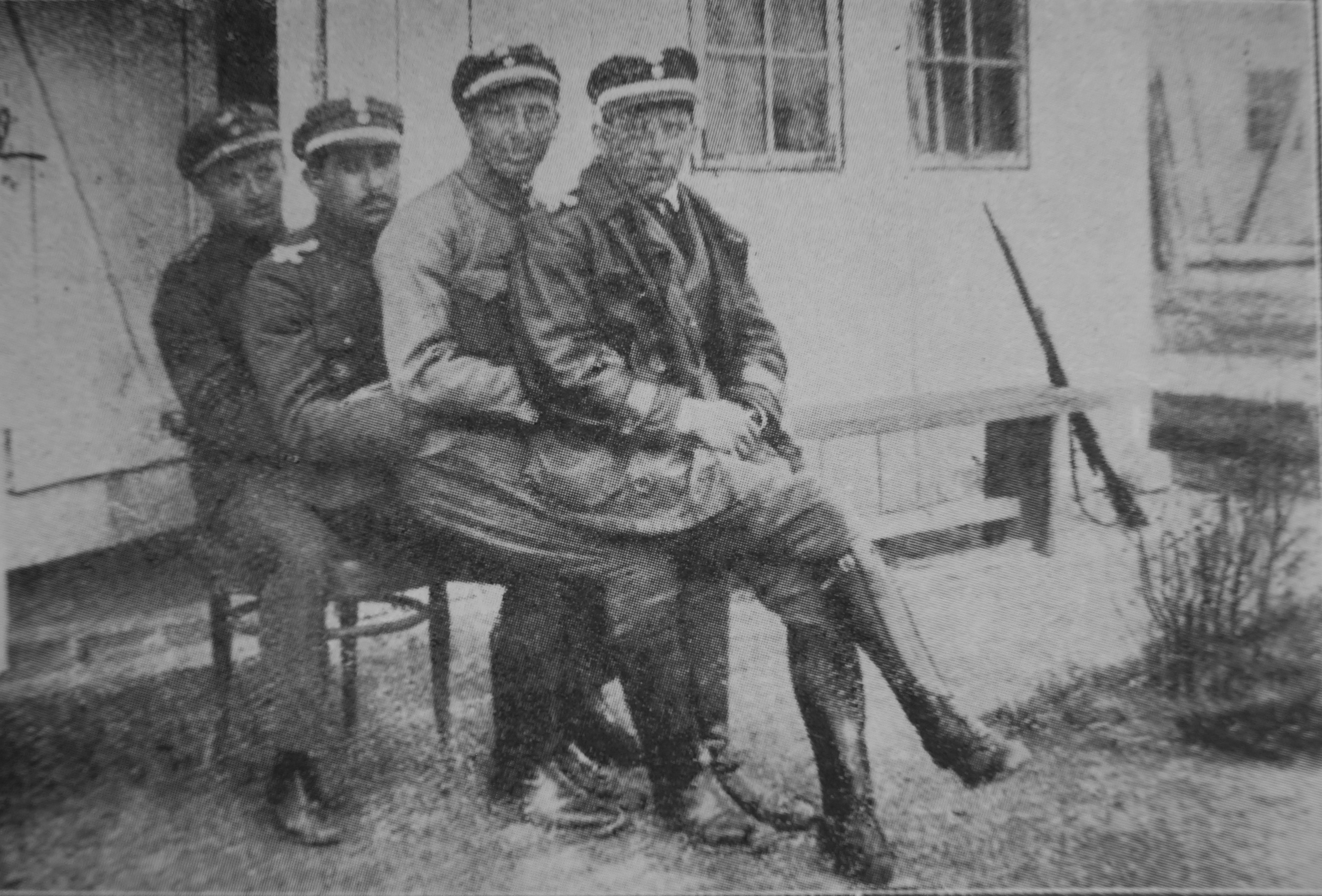 6 eskadra wywiadowcza. Czwórka przyjaciół: Franciszek Peter, Ludwik Idzikowski, Ryszard Hesse, Stanisław Pietruski